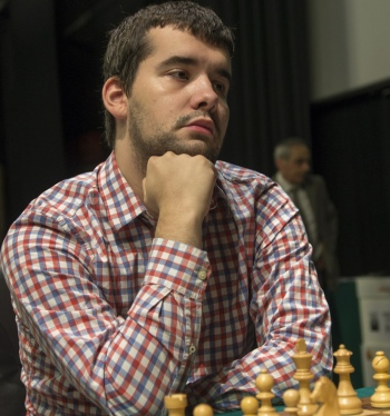 Ян Непомнящий